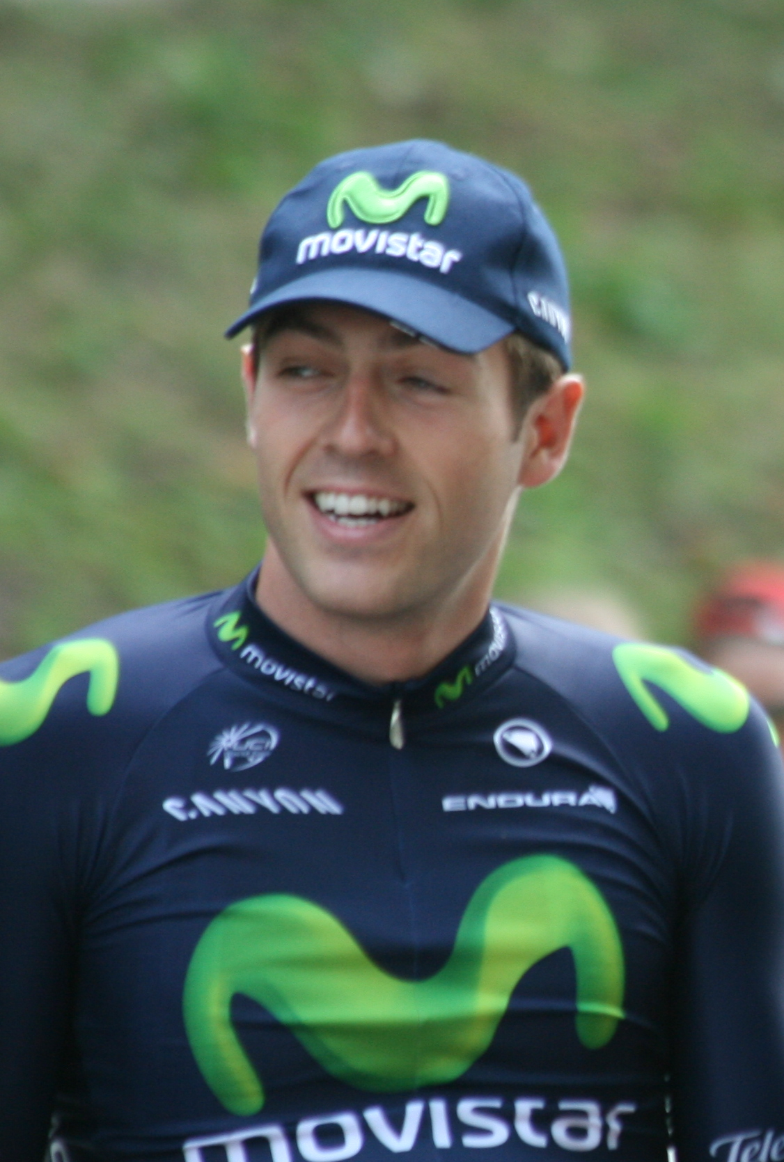 ploegenpresentatie Tour de France 2015 Utrecht